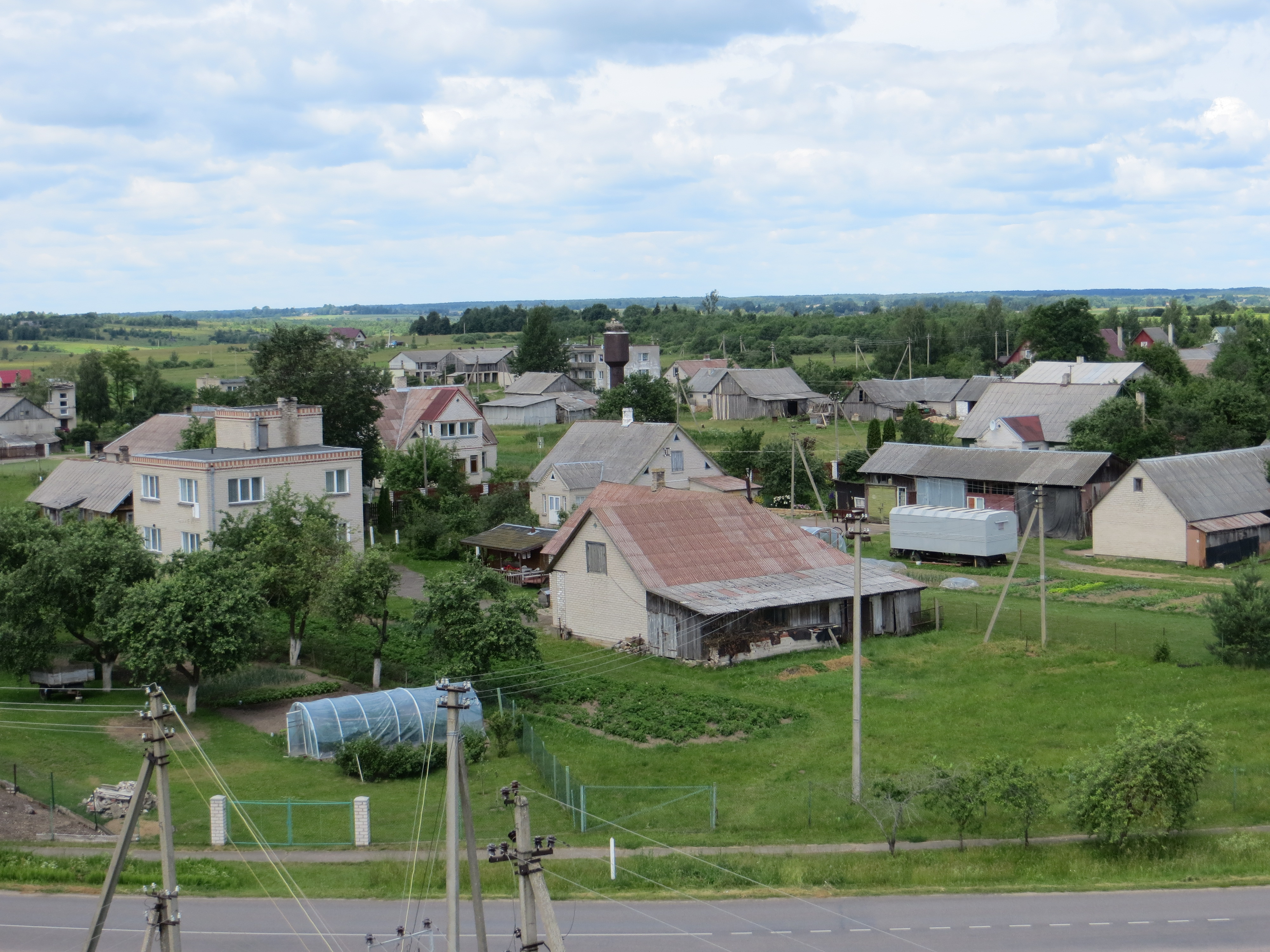 Medžiukai 19156, Lithuania